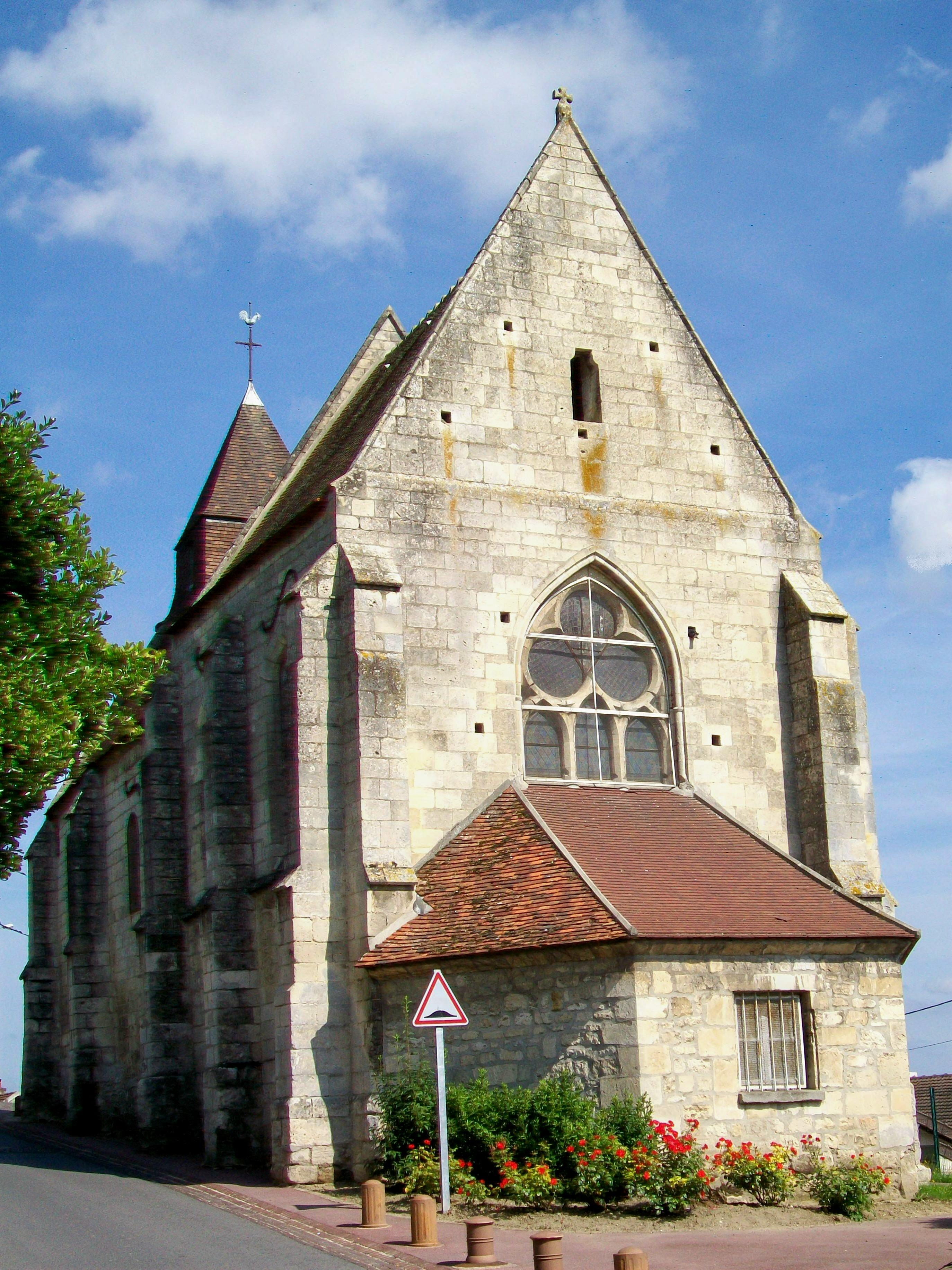 L'église Saint-Leufroy depuis le sud-est.